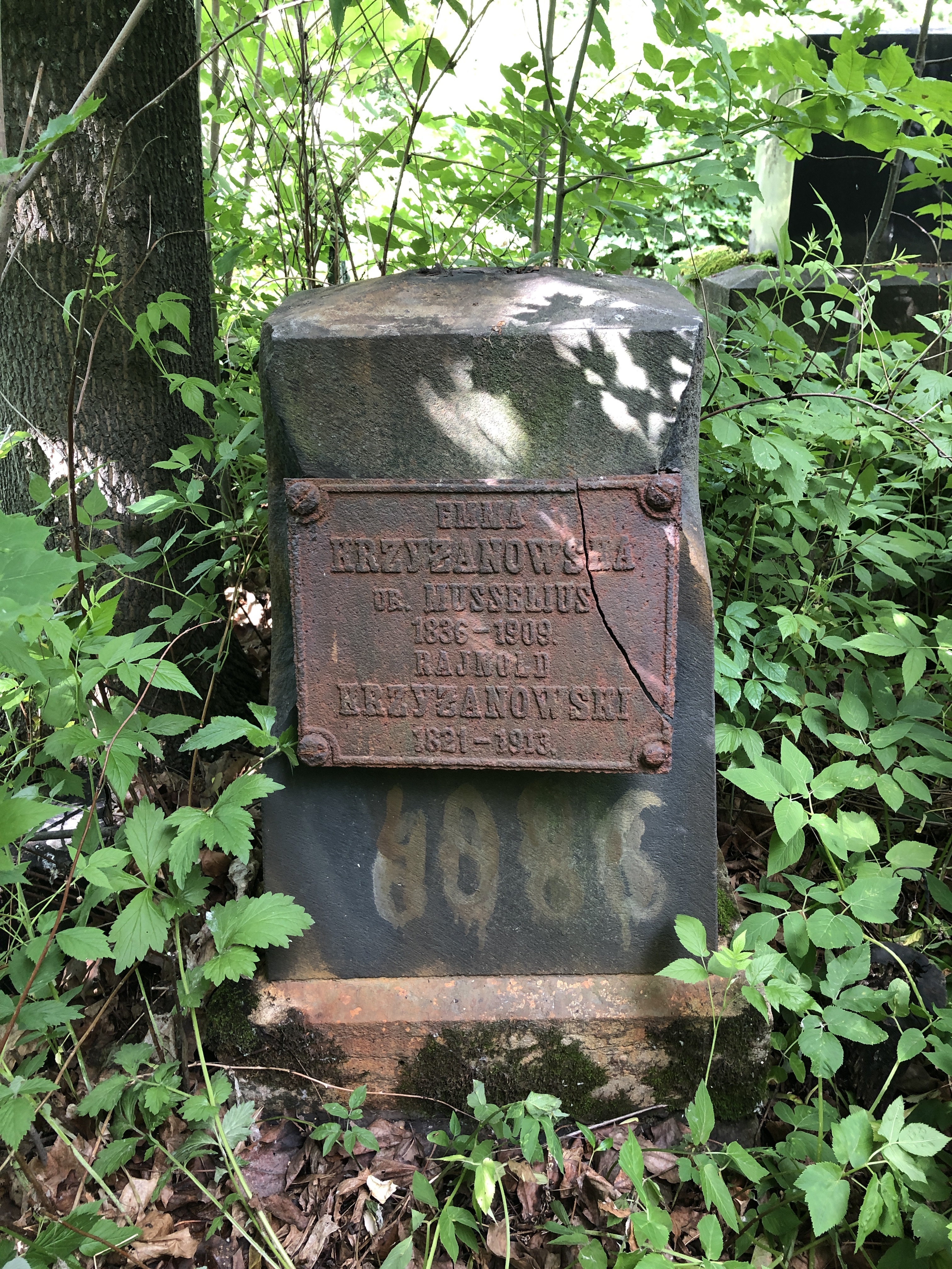 Волковское лютеранское кладбище, Санкт-Петербург